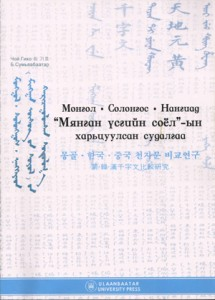 Монгол: Б. Сумъяабаатар, "Монгол - Солонгос - Нангиад, "Мянган үсгийн" соёлын харицуулсан судалгаа", хуудас 268, 2011, ISBN 978-99962-842-3-6